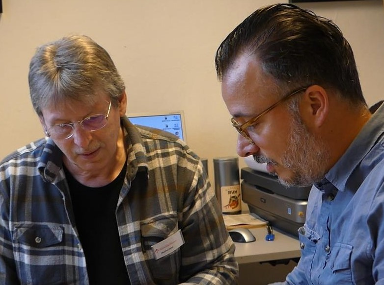 Manfred Kohrs & Ole Wittmann in ihrem Forschungsbüro im Museum für Hamburgische Geschichte (MHG). Oktober 2019, letzte Vorbereitungen zur Warlich-Ausstellung.